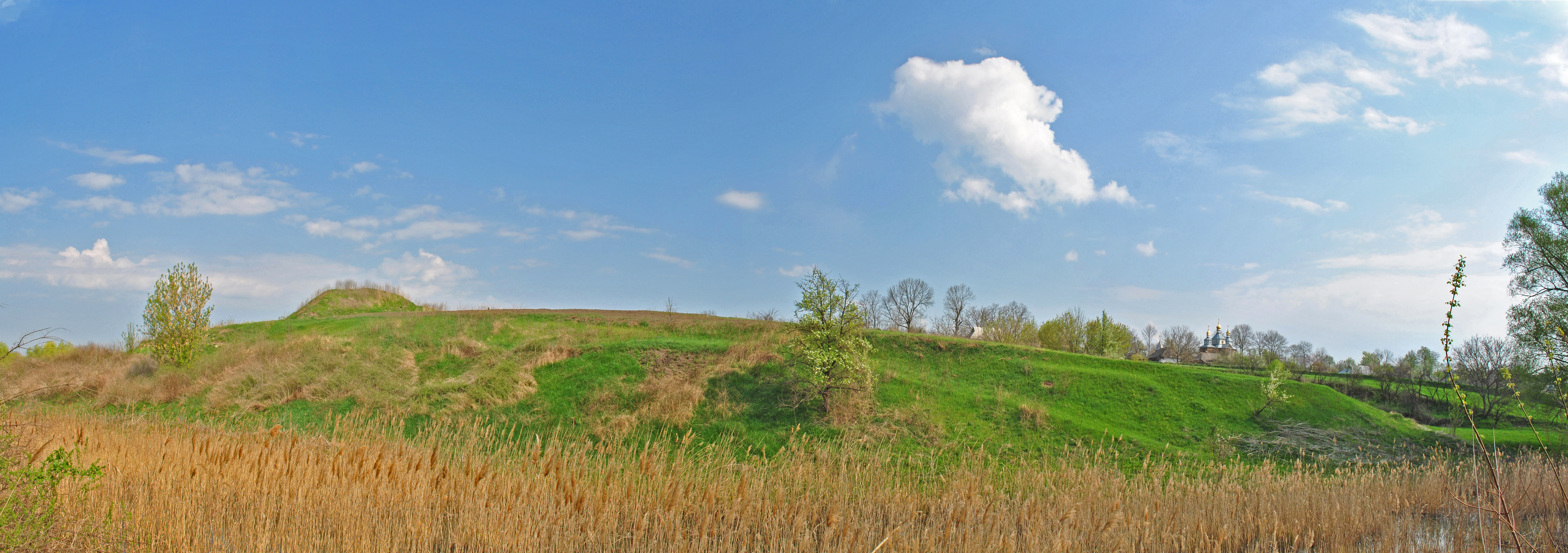 «Урочище Чагарі», Ставищенський район, Антонівська сільська рада